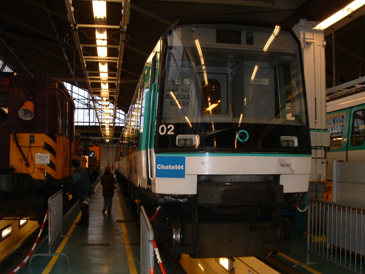 Train MF 88 garé à côté d'un train de travaux aux ateliers de Choisy.